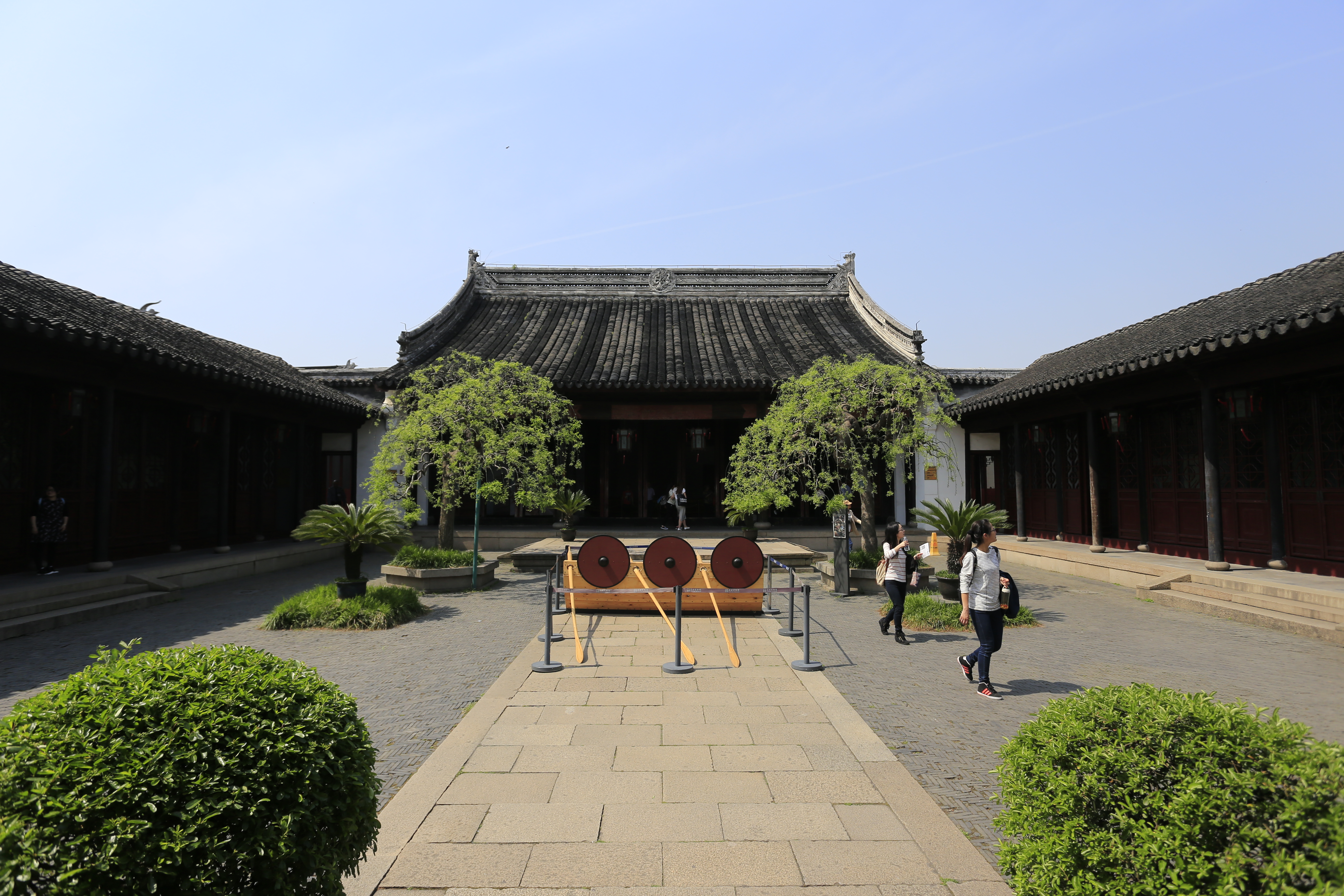 苏州太平天国忠王府 正殿大厅